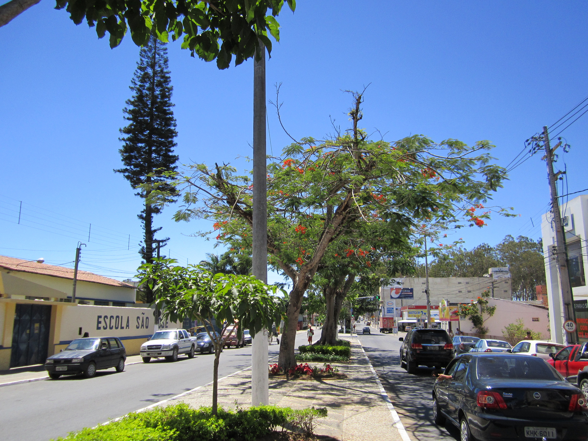 Avenida Rui Barbosa com a Escola São José à esquerda - Heliópolis - Garanhuns, Pernambuco, Brasil